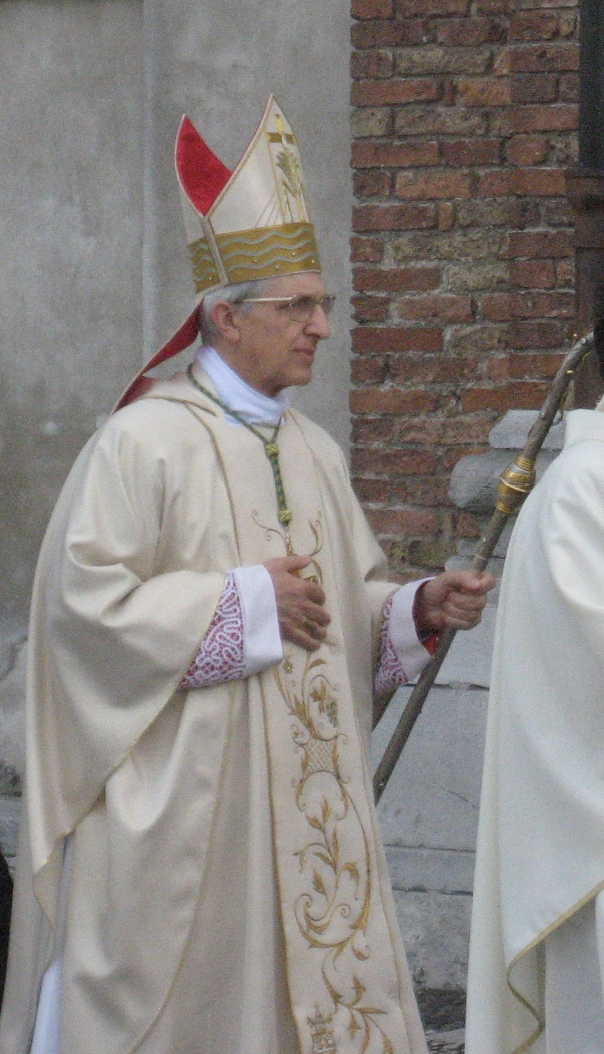 Mons. Dante Lafranconi